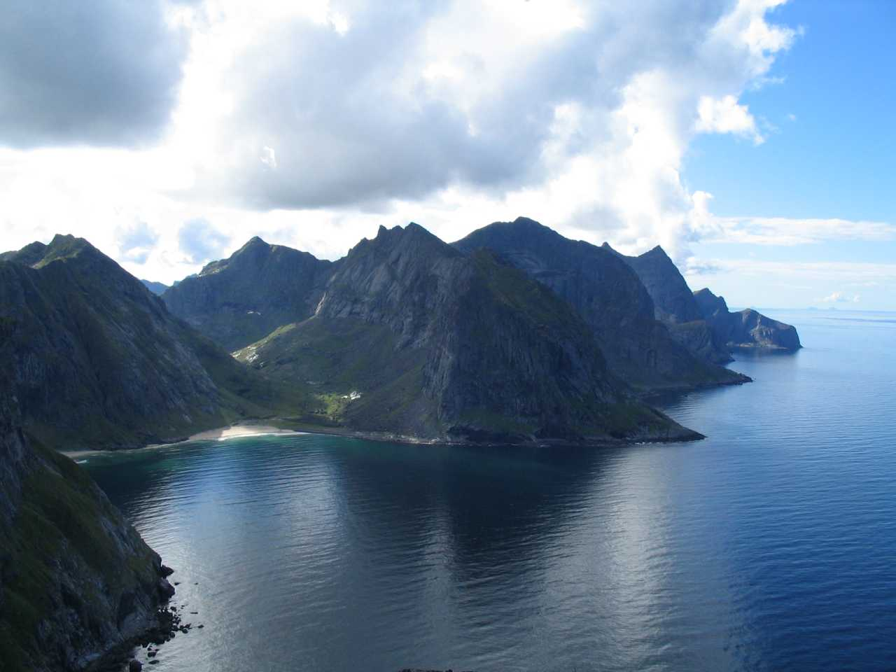 Iles Lofoten